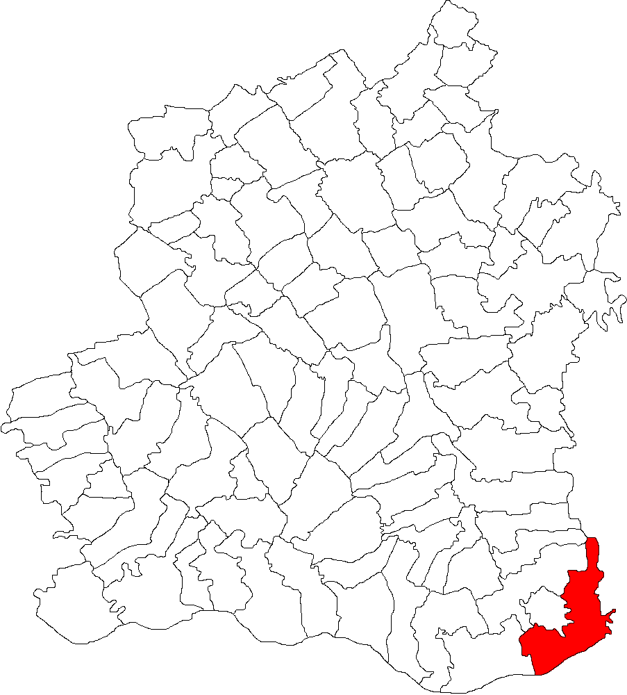 Categorie:Hărţi ale judeţului Teleorman